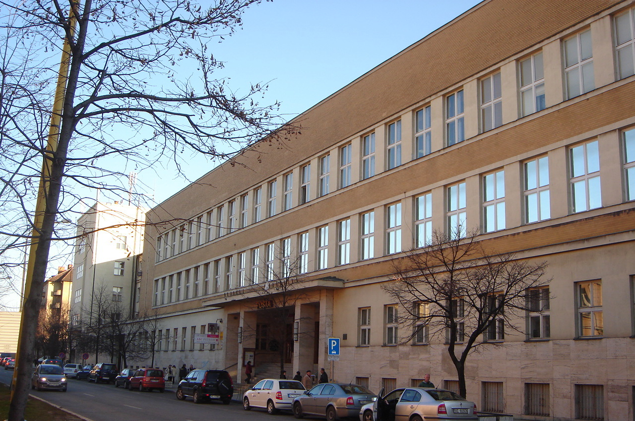 súčasný pohľad na budovu pošty